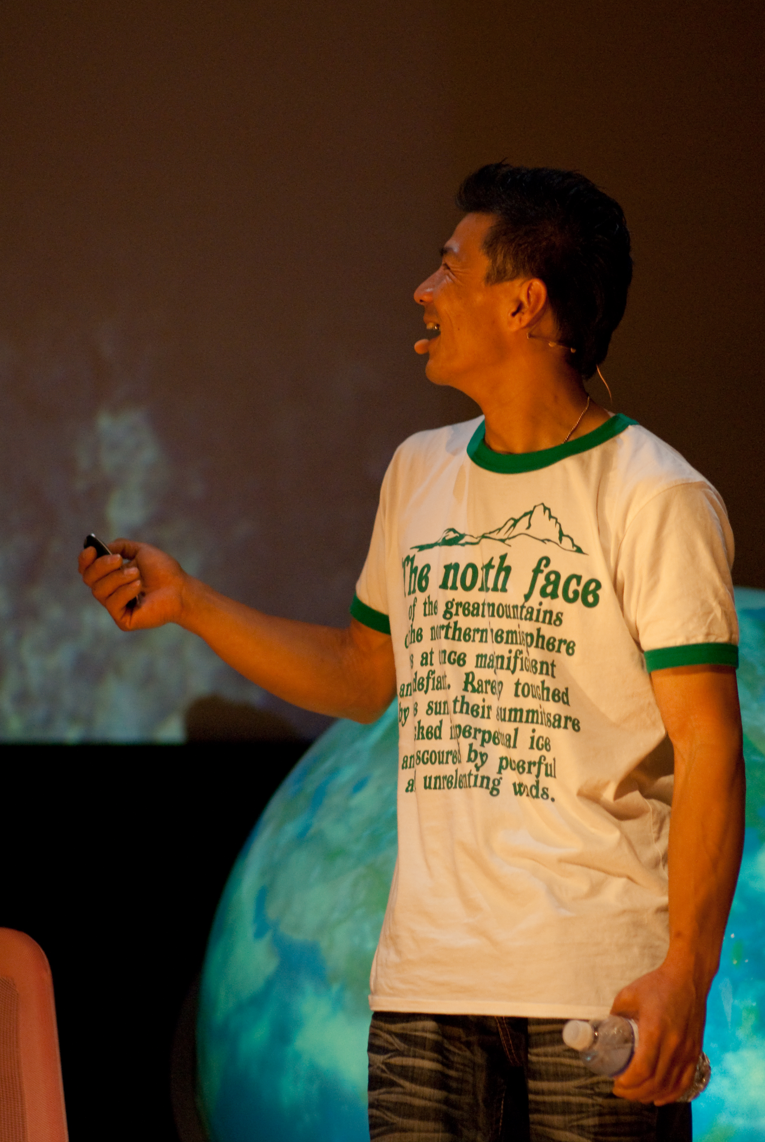 Yuji Hirayama at TEDxTokyo 2009